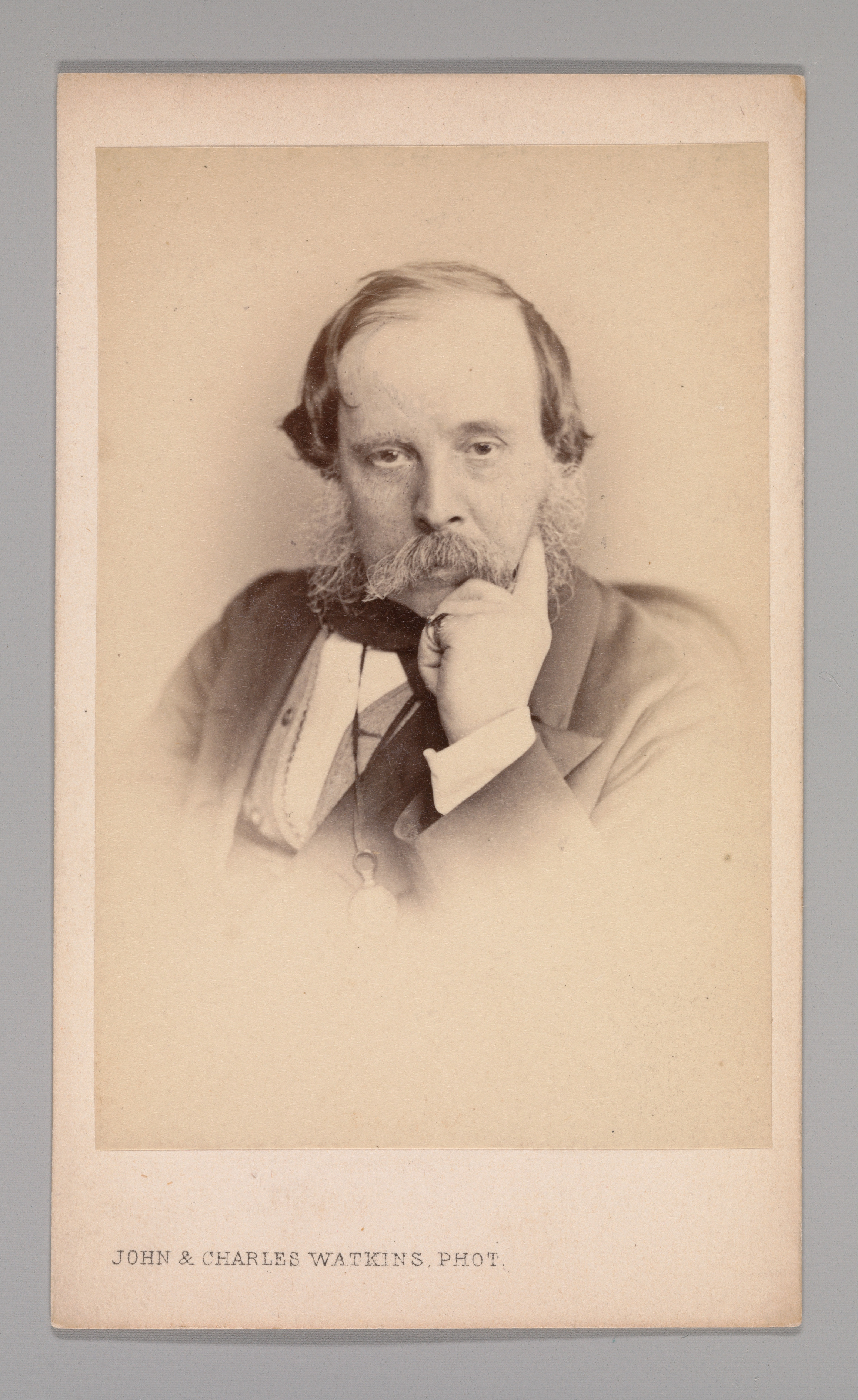 Carte-de-visite; Photographs